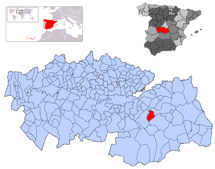 Villanueva de Bogas en la provincia de Toledo